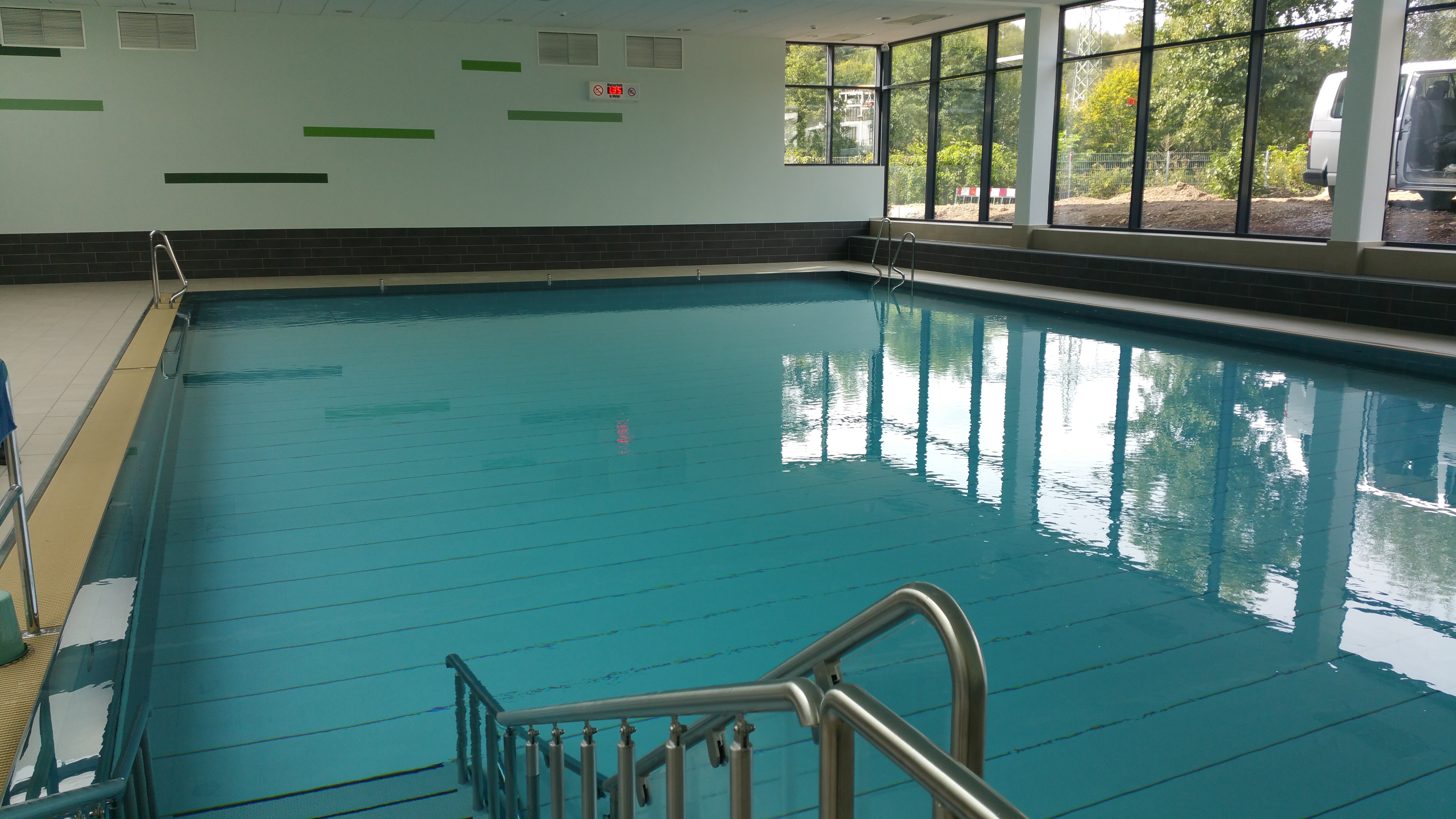 Hubboden